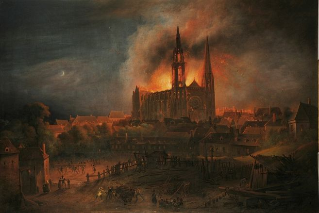 Tableau de l'incendie de la Cathédrale Notre-Dame de Chartres, peint en 1836 par François Alexandre Pernot.